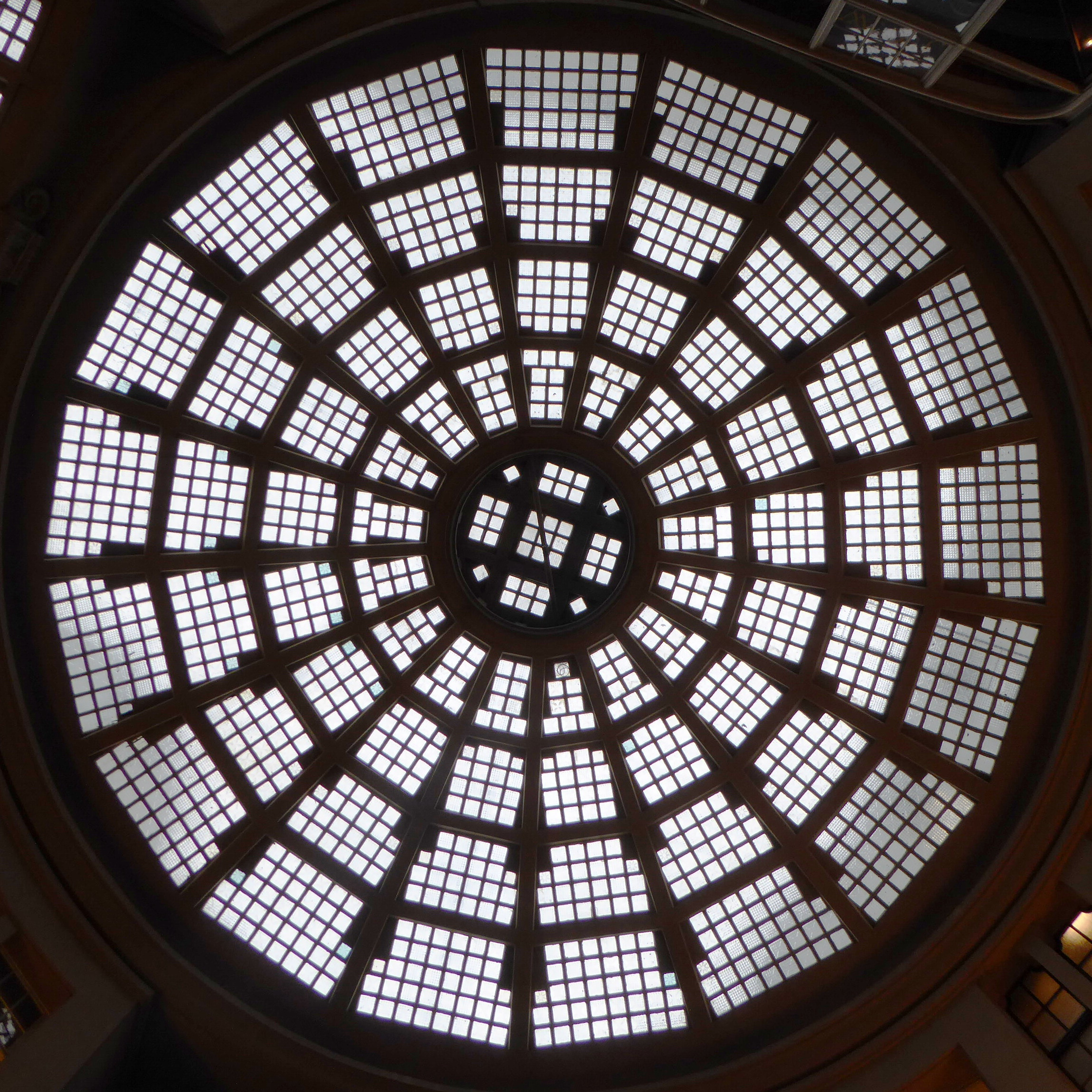 Leipzig, 17-strahlige Dachkuppelrosette in der Mädlerpassage. Architekt: Theodor Kösser (1854–1929).